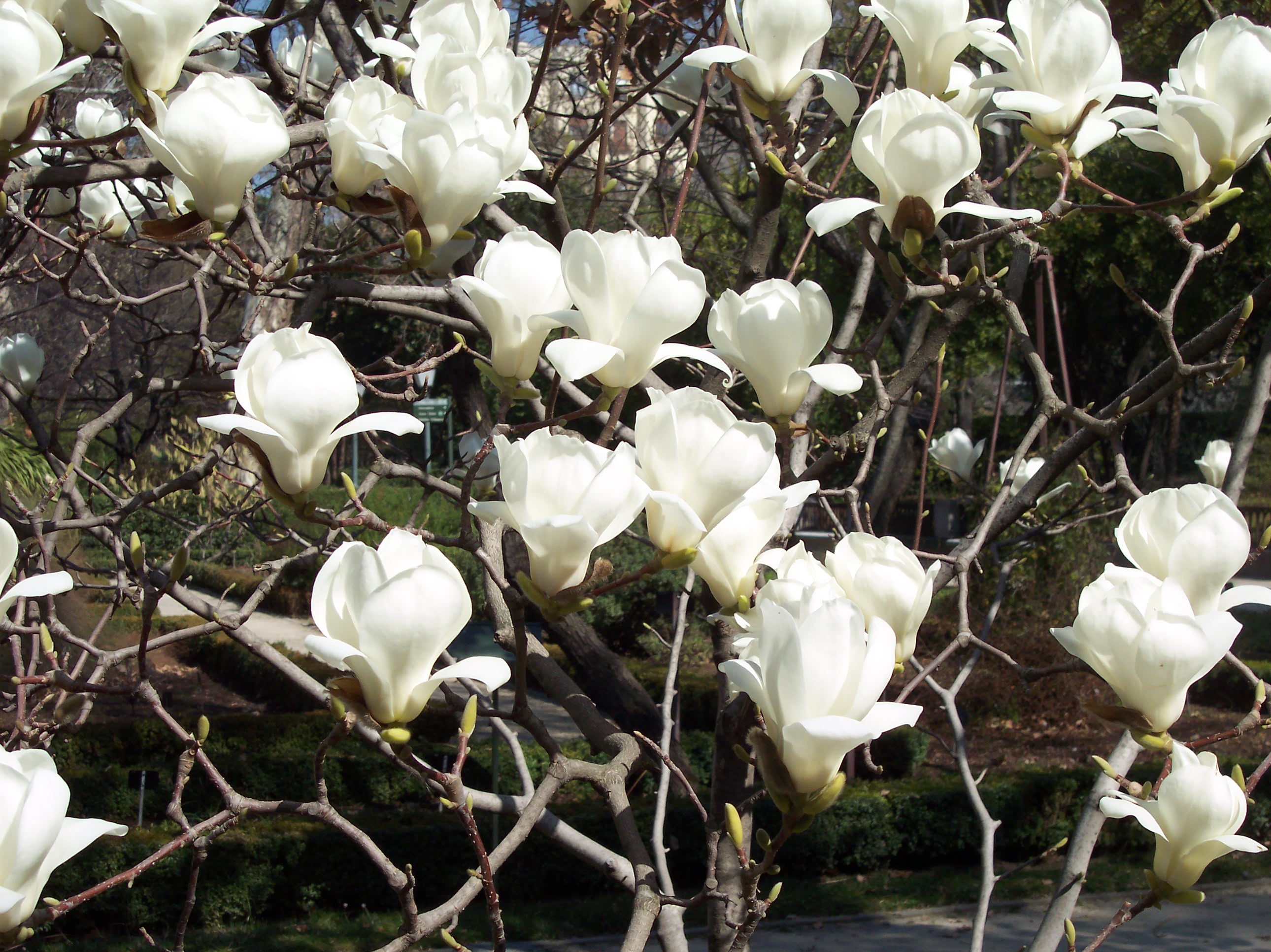 Magnolia denudata. Real Jardín Botánico, Madrid